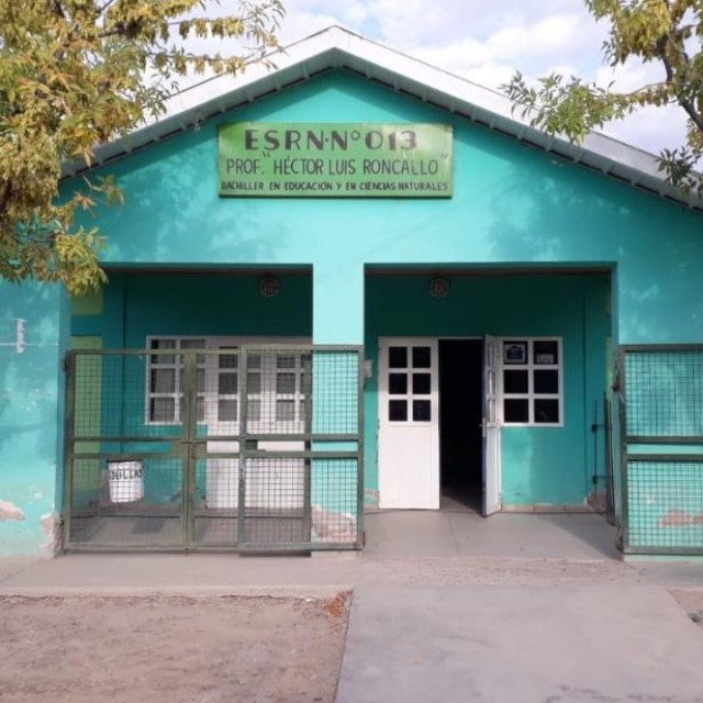 Escuela secundaria, ubicada en la localidad de Mainque, provincia de Rio Negro, republica Argentina.